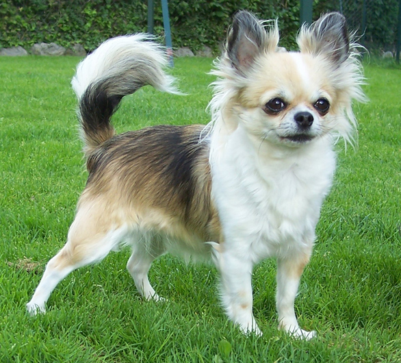 Babylone de Vindhyana Valley - Chihuahua Poil Long - Lice RECOMMANDEE (cotation 4/6)